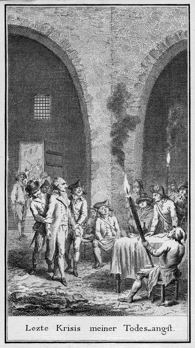 Illustration (zu den Septembermorden 1792) aus: François de Jourgniac Saint-Méard: Wichtiger Beytrag zur Geschichte des zweyten und folgenden Septembers und der neuesten französischen Revolution. Frankfurt und Leipzig 1793